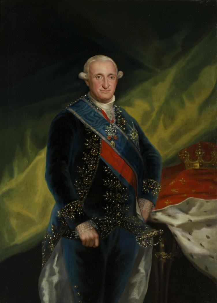 Retrato del rey Carlos IV de España (1748-1819), que fue hijo del rey Carlos III y de la reina María Amalia de Sajonia.